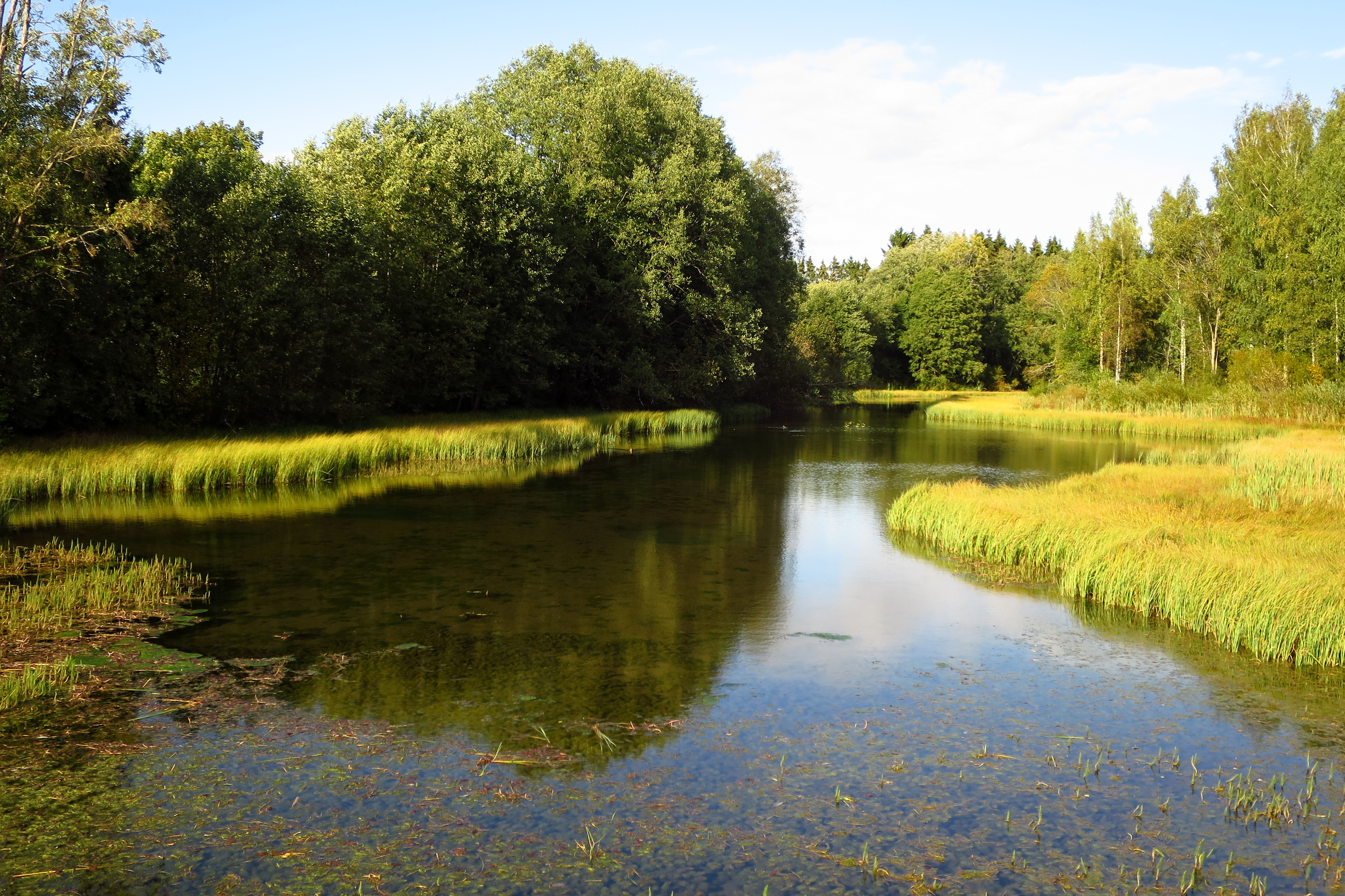 Jäneda Väike Allikajärv